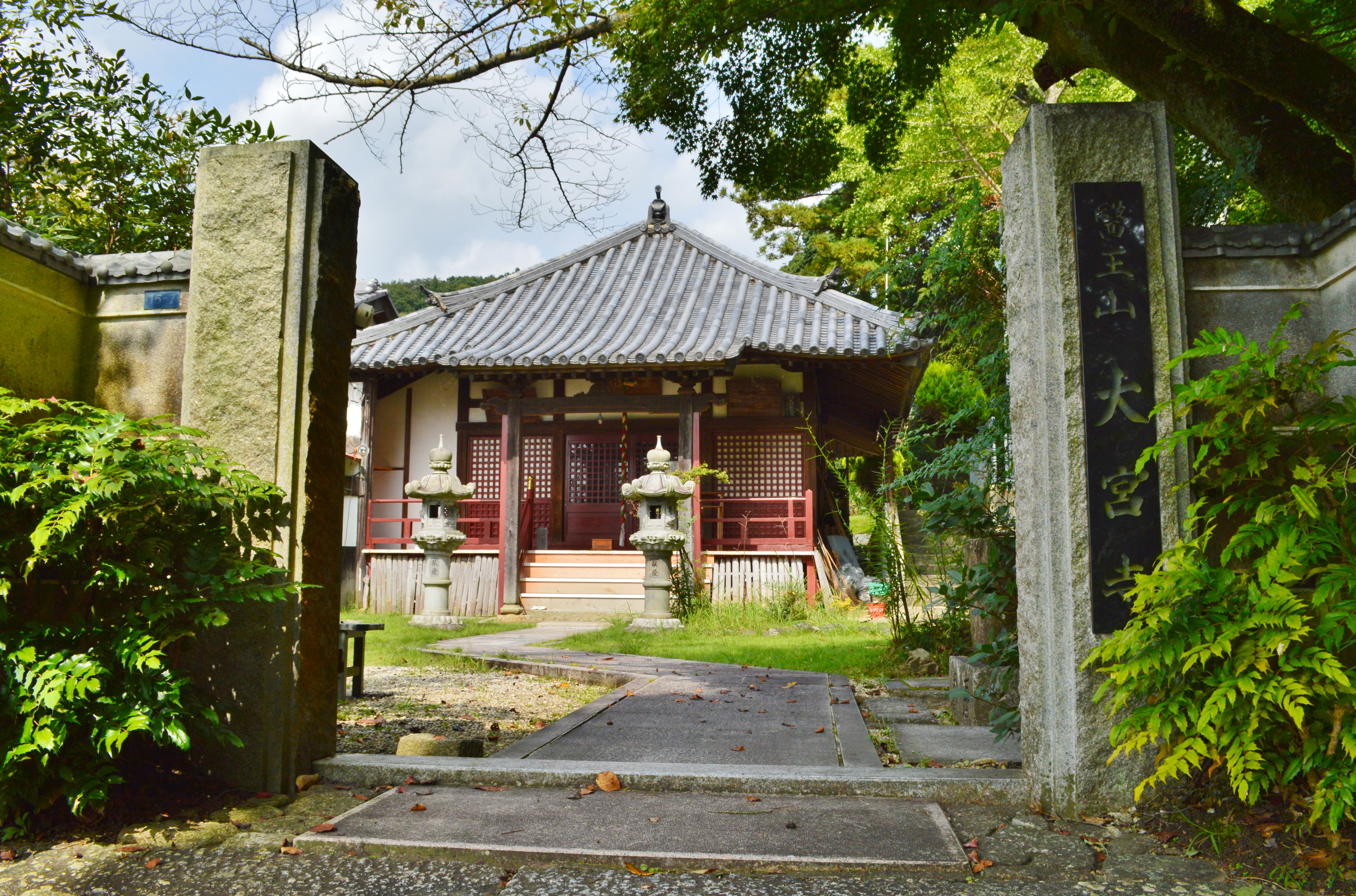 大宮寺 (箕面市) 本堂